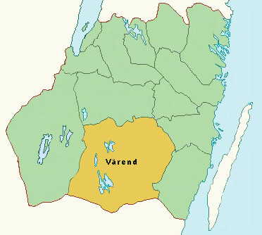 Värend